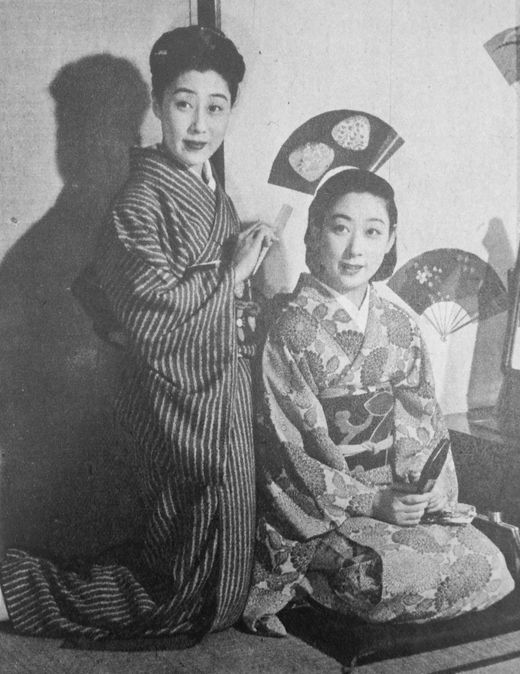 山田五十鈴（左）と花柳小菊（右）